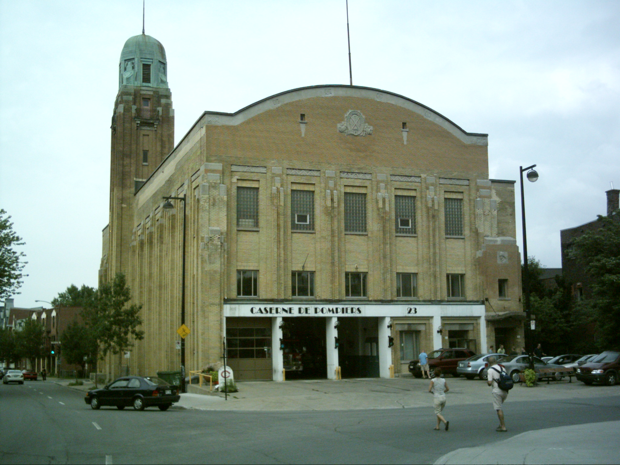 Caserne de pompier no. 23, place Saint-Henri, Montréal